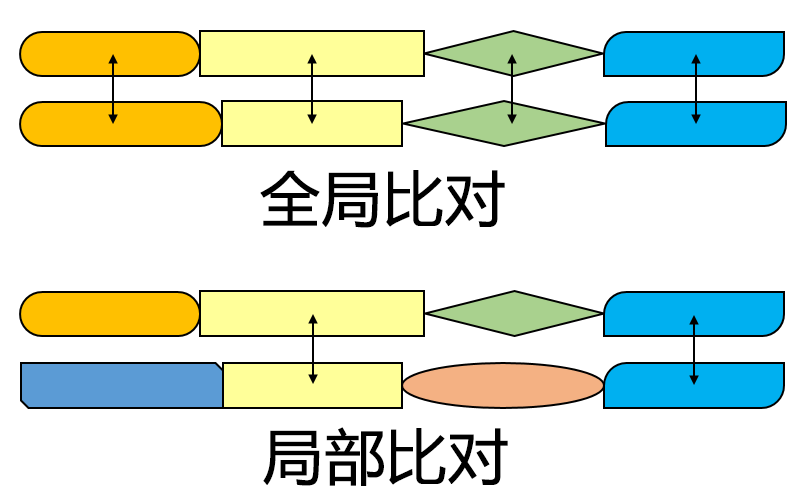 以直观的方式比较了全局和局部比对。